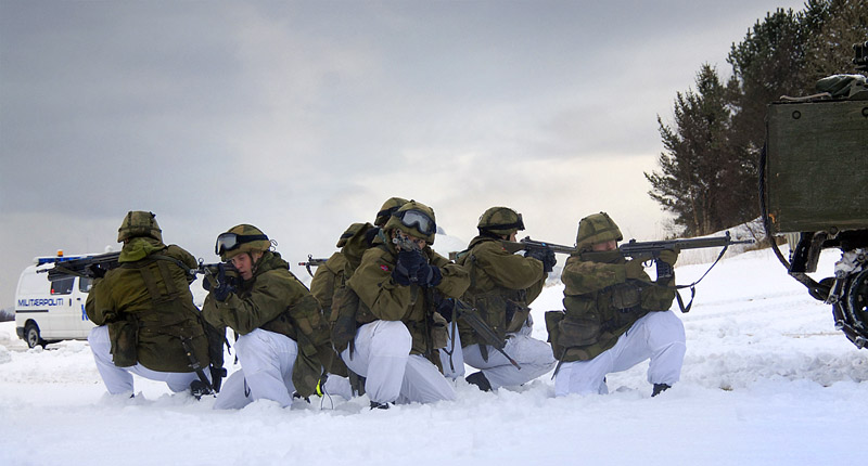 Stormlag fra 2. bataljon under øvelse Grey Wolf i Bodø, 15-18. januar 2007.